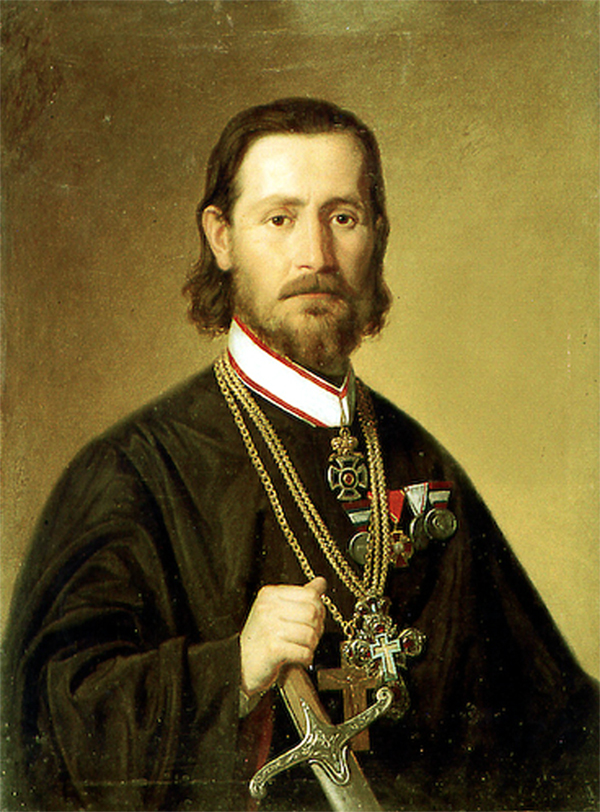 Нићифор Дучић (1832 - 1900).